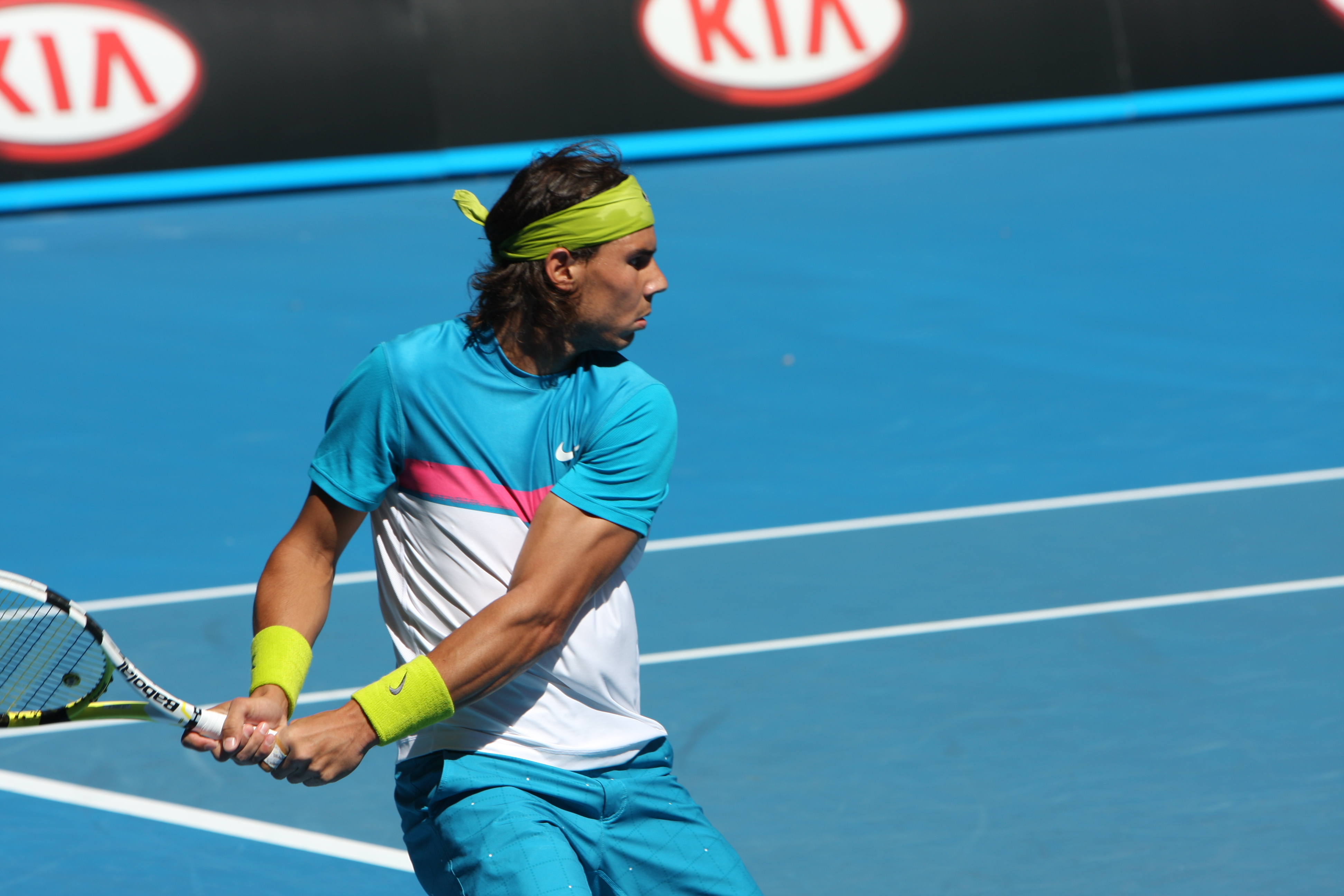 El tenista español Rafa Nadal, en el Australian Open 2009.